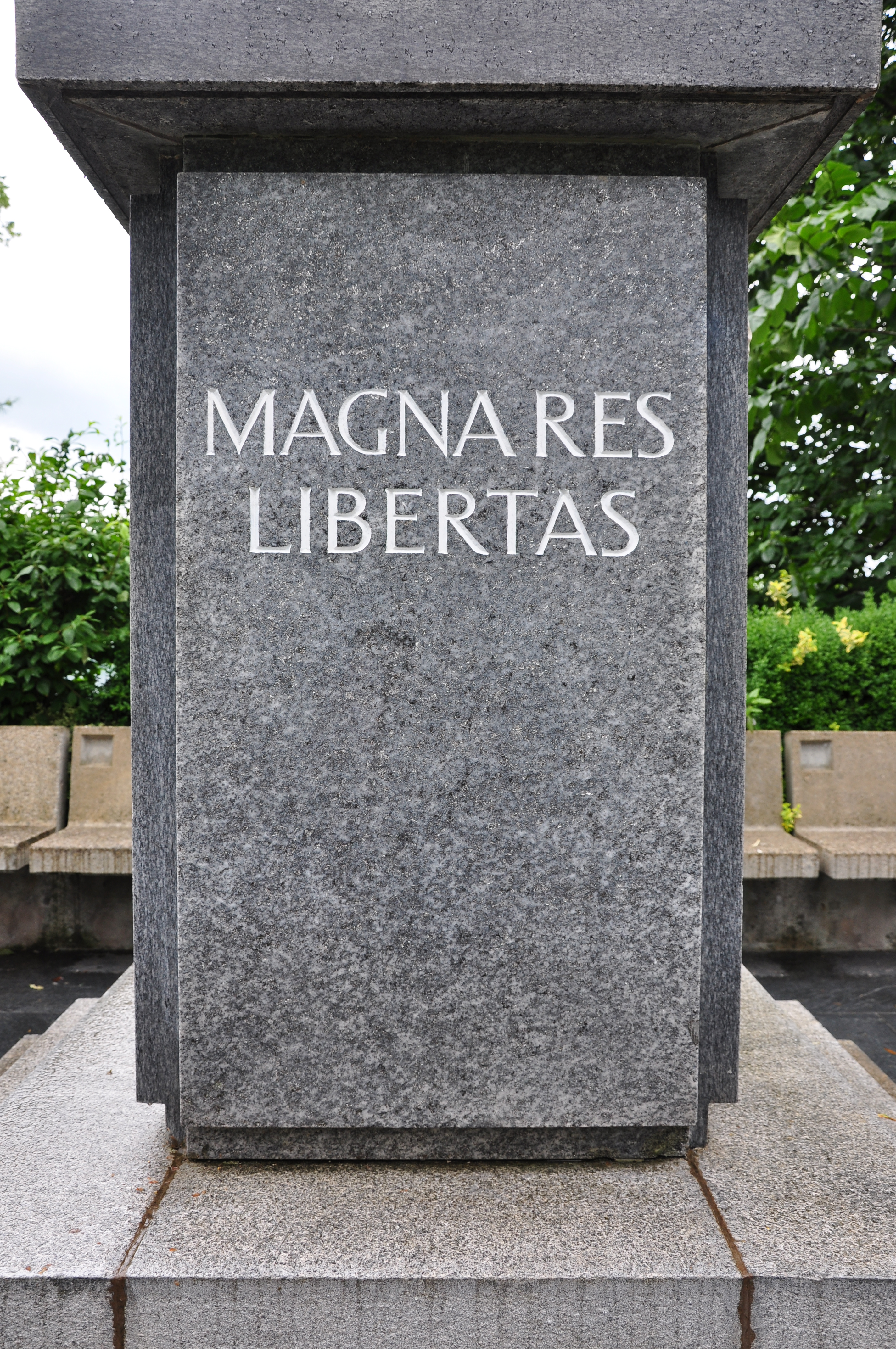 Polnische Freiheitssäule in Rapperswil (SG) at the eastern side of Schloss Rapperswil